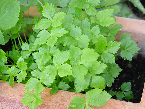 Description: Mitsuba (Cryptotaenia japonica).